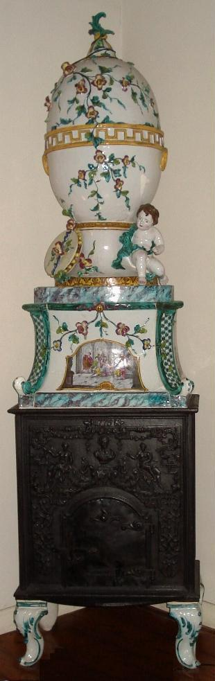 Stockelsdorfer Fayence-Ofen